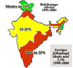 Förbättrad karta över befolkn.ökn./ Indien